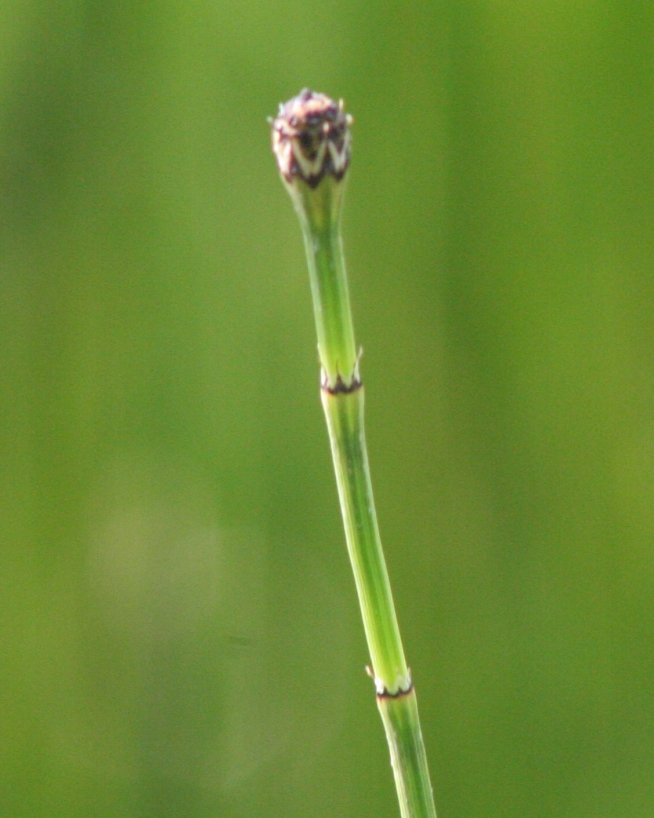 Equisetum_variegatum (Equseto variegato) Località : Giardino Botanico Alpino "Giangio Lorenzoni", Pian Cansiglio, Tambre d'Alpago (BL), 1000 m s.l.m.